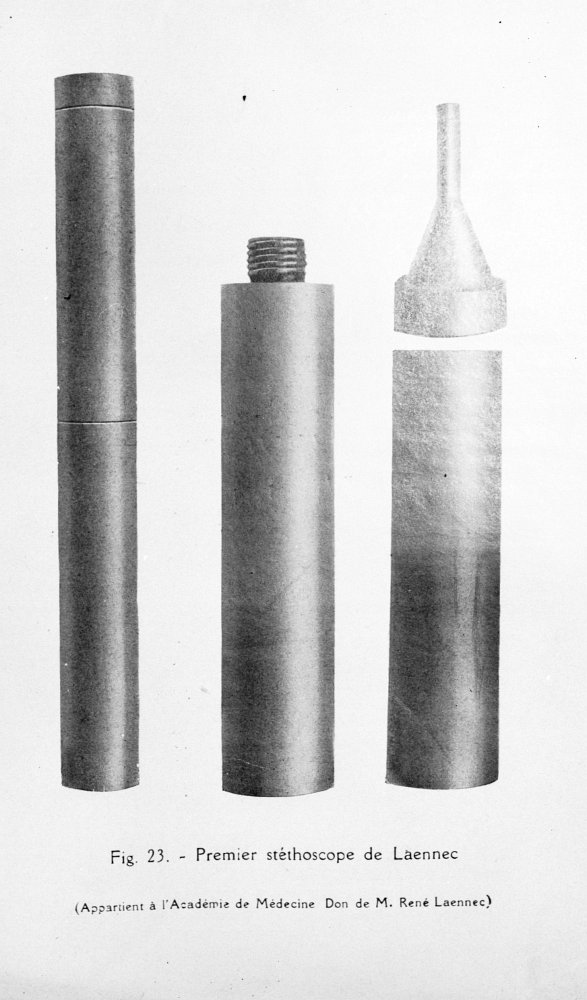 Réf. image : 02518 Premier stéthoscope de Laennec Mots-clés : Appareils et matériels. Médecine . 20e siècle Ouvrage : Les Biographies médicales. Notes pour servir à l'histoire de la médecine et des grands médecins Edition : Paris : J.-B. Baillière, s.d. Cote : 134333 Empl. de l'image : Fig. 23 Adresse permanente de cette image